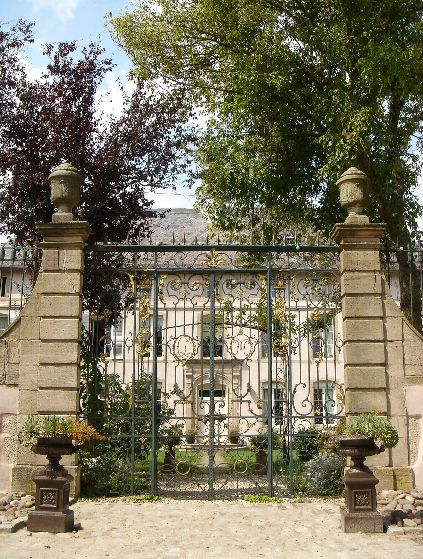 La façade principale du Château de Failloux, Epinal/Jeuxey (France)